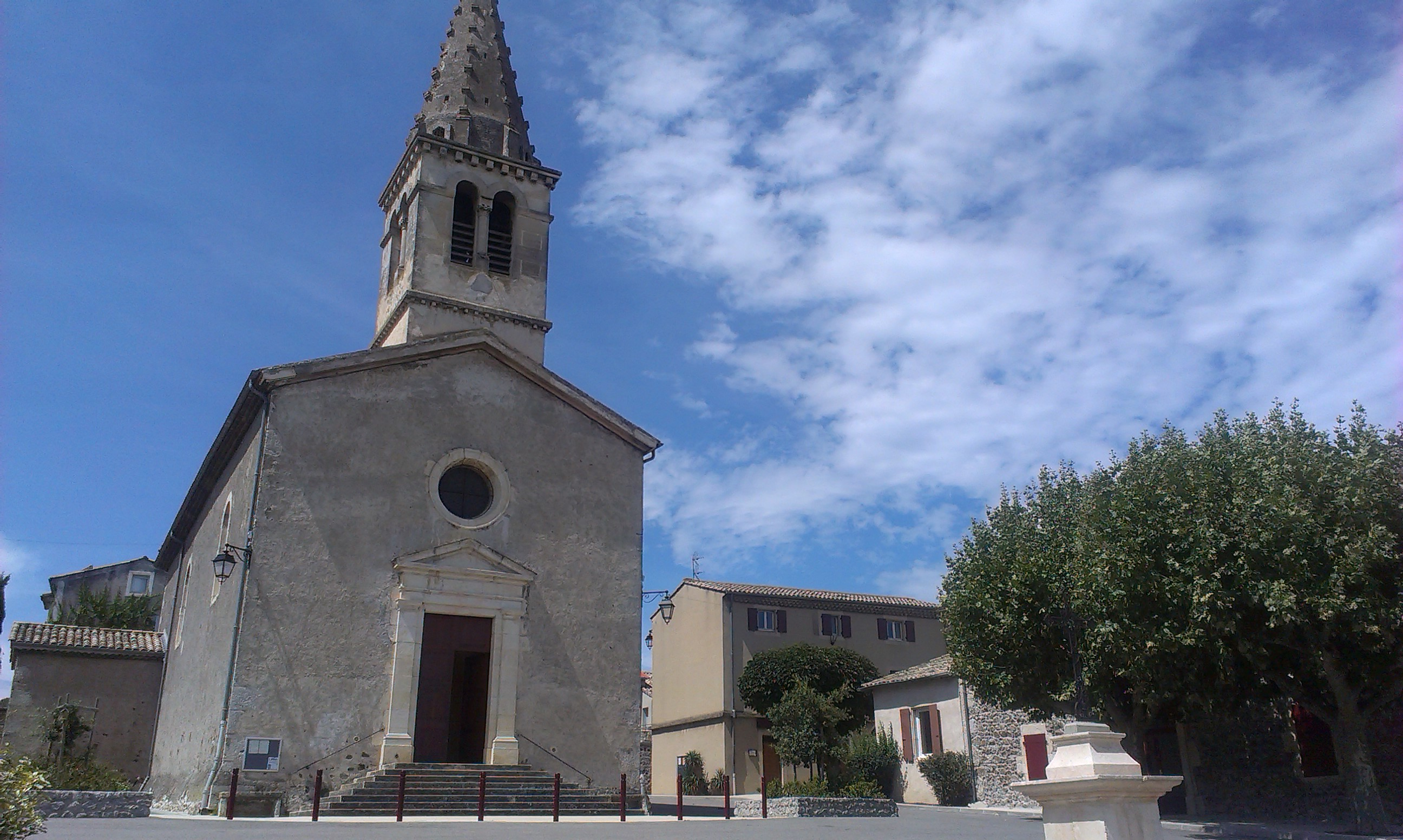 Saint-Lager-Bressac - église